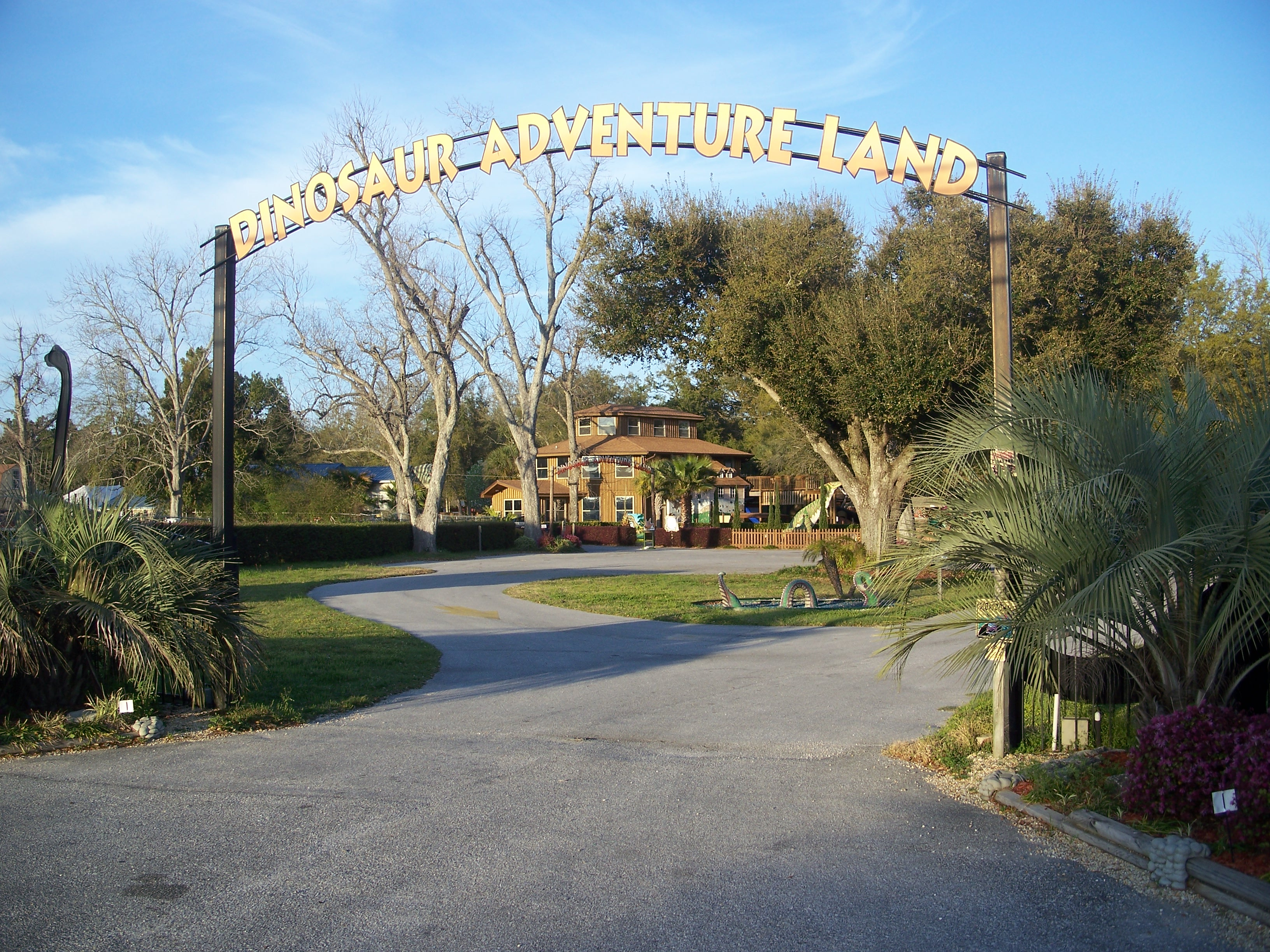 Entrance to Dinosaur Adventure Land in Pensacola, Florida.